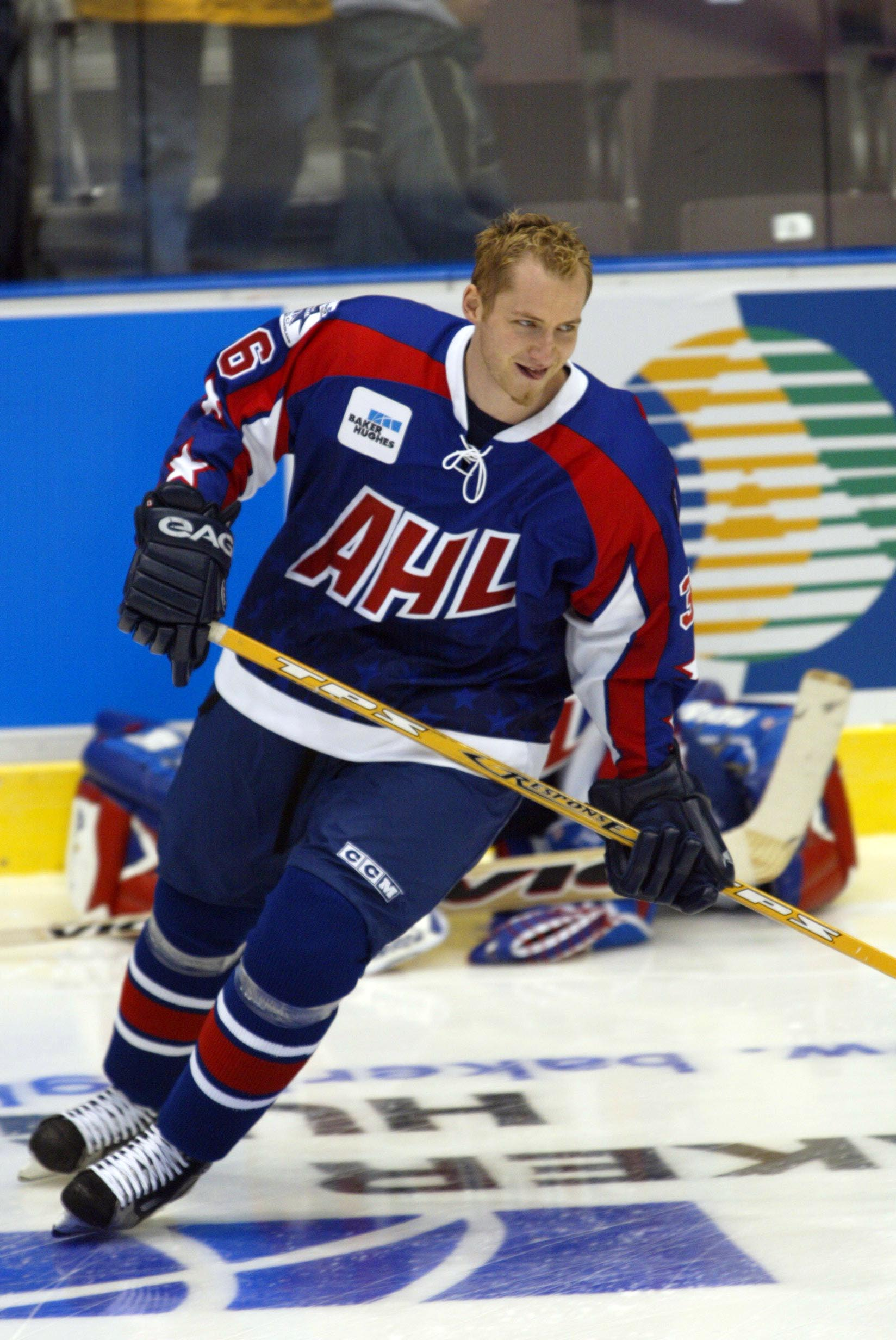 AHL All-Star Game 2002